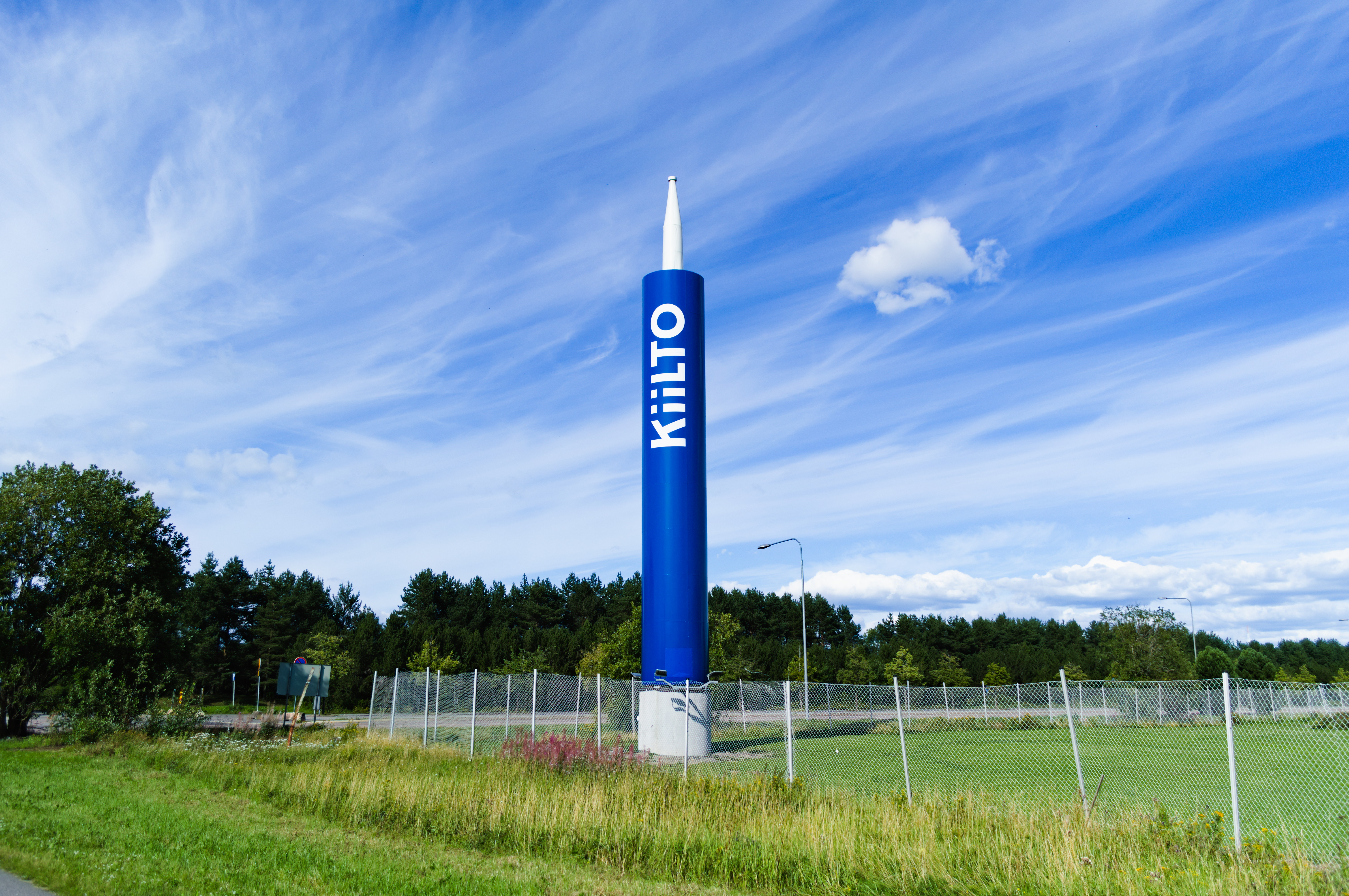 Kiilto Oy:n mainospylväs